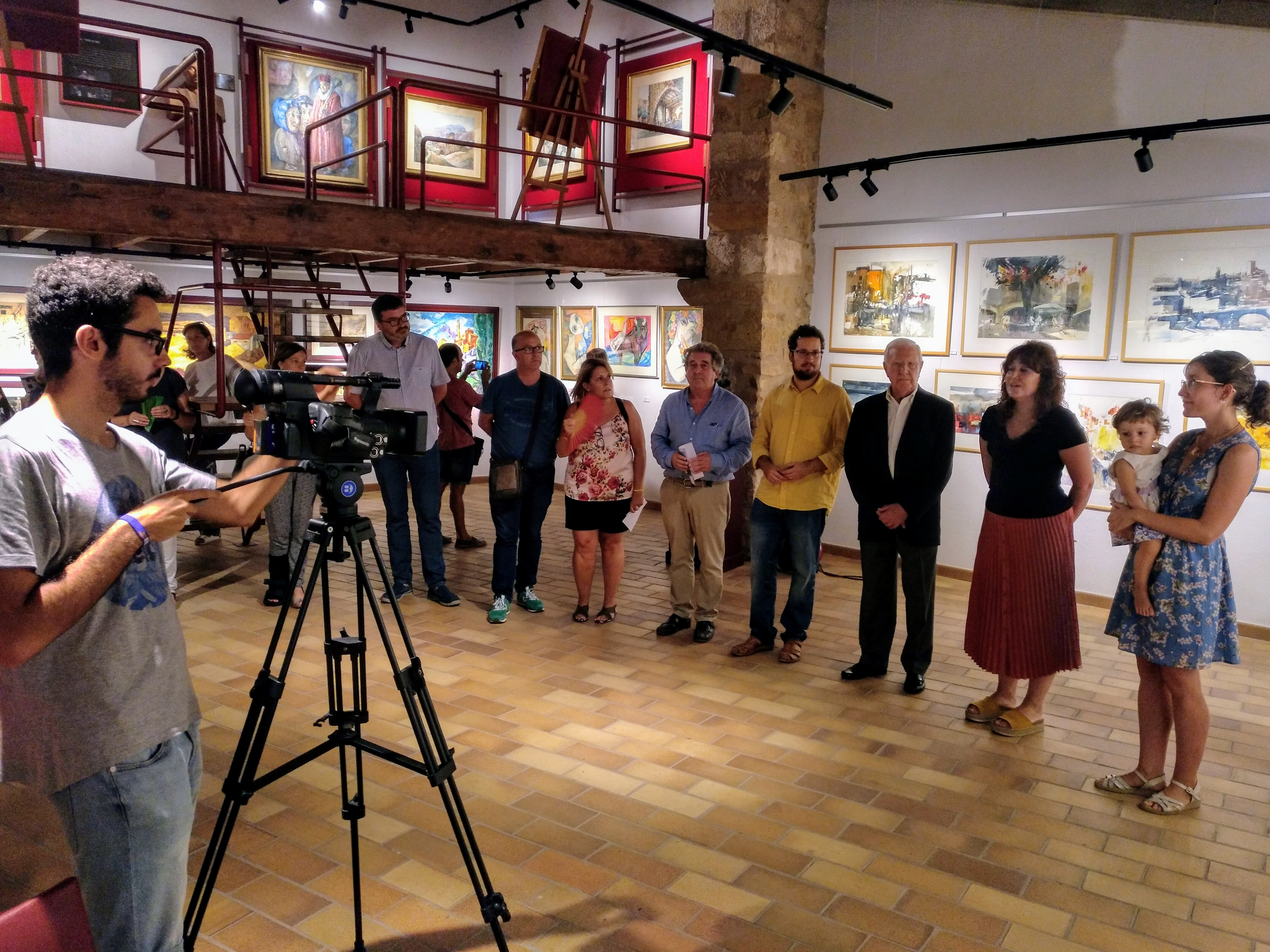 Des del 2019 el Museu Comarcal de la Conca de Barberà disposa d'un espai dedicat al pintor, escultor i ceramista Maties Palau Ferré